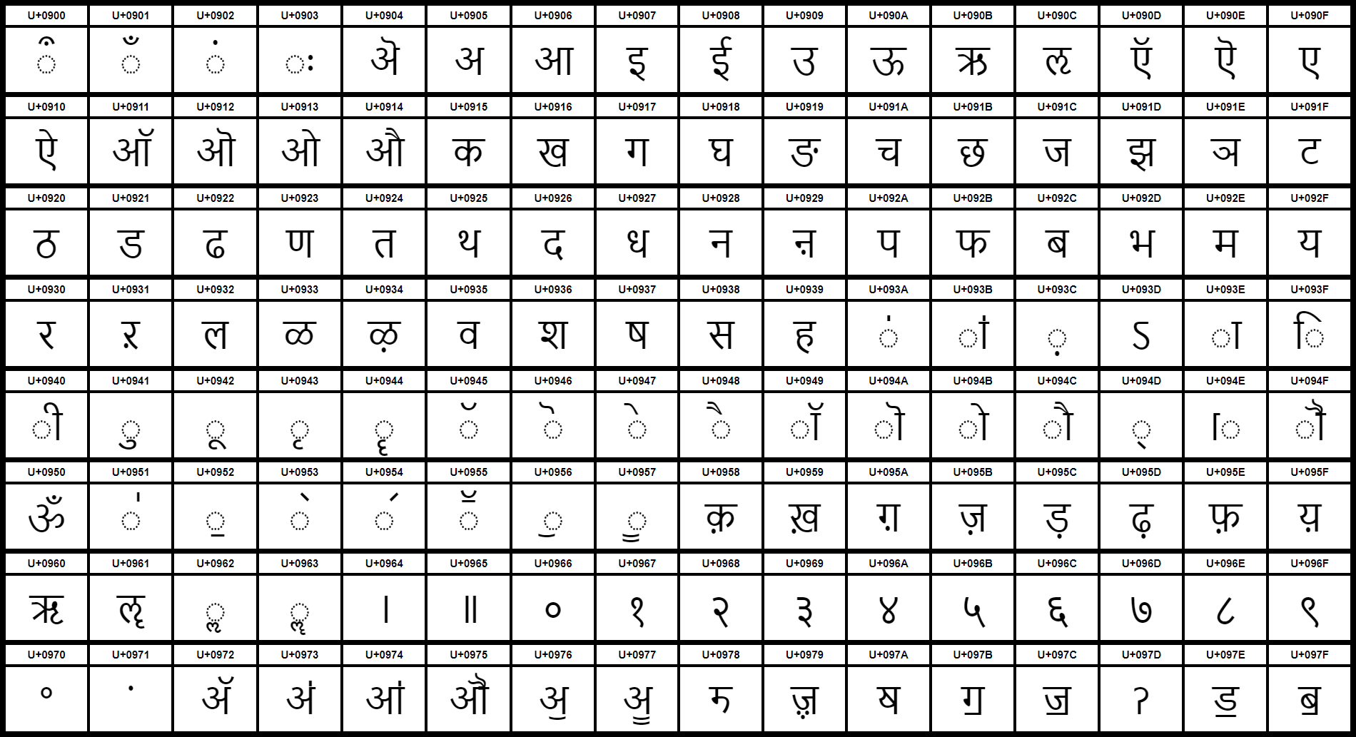 Grafiktafel für den Unicodeblock Devanagari. Schraffierte Felder sind unbesetzte Codepoints.